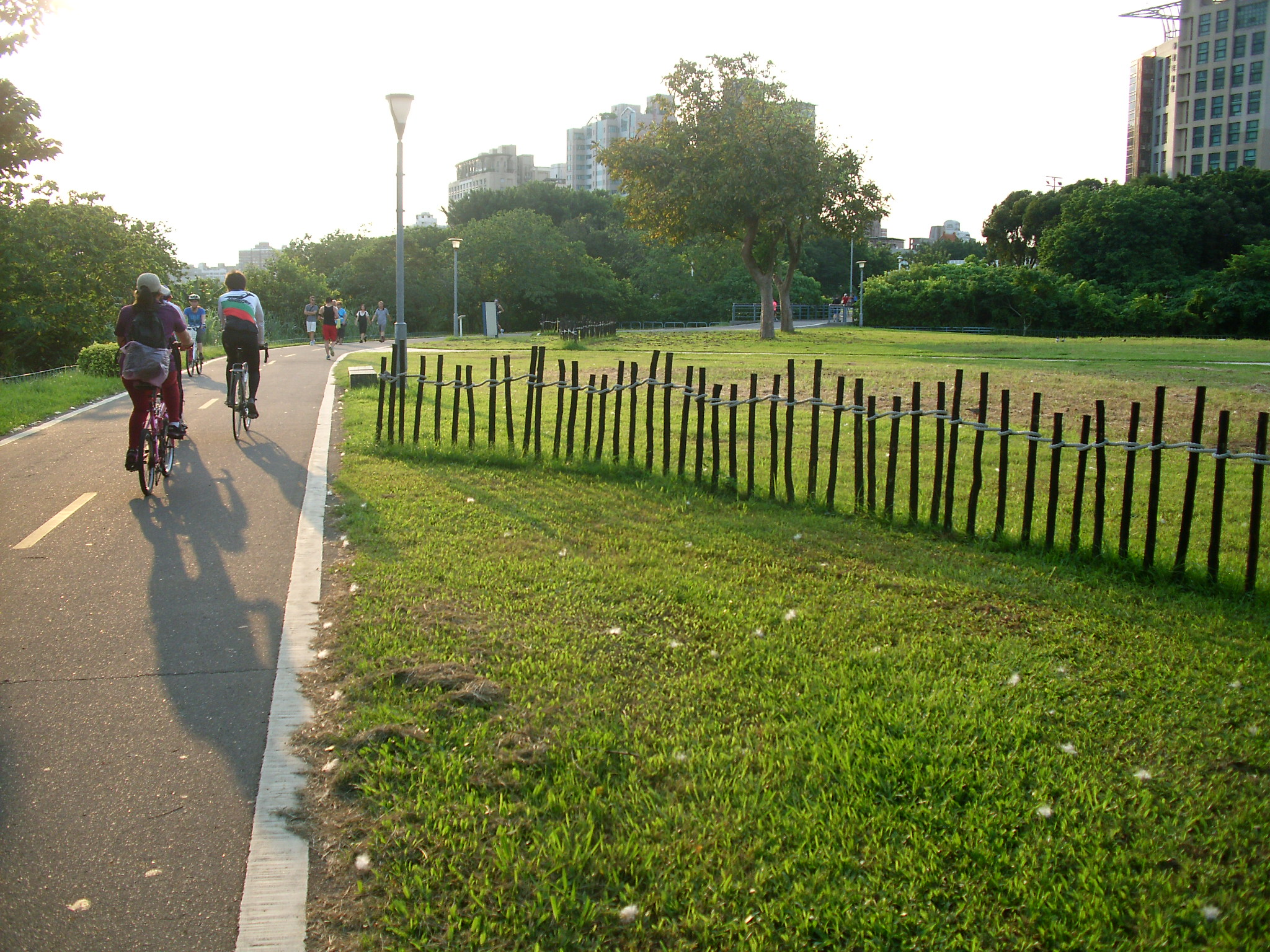 中文（台灣）: 新店溪右岸自行車道(古亭河濱公園LOVE廣場路段)